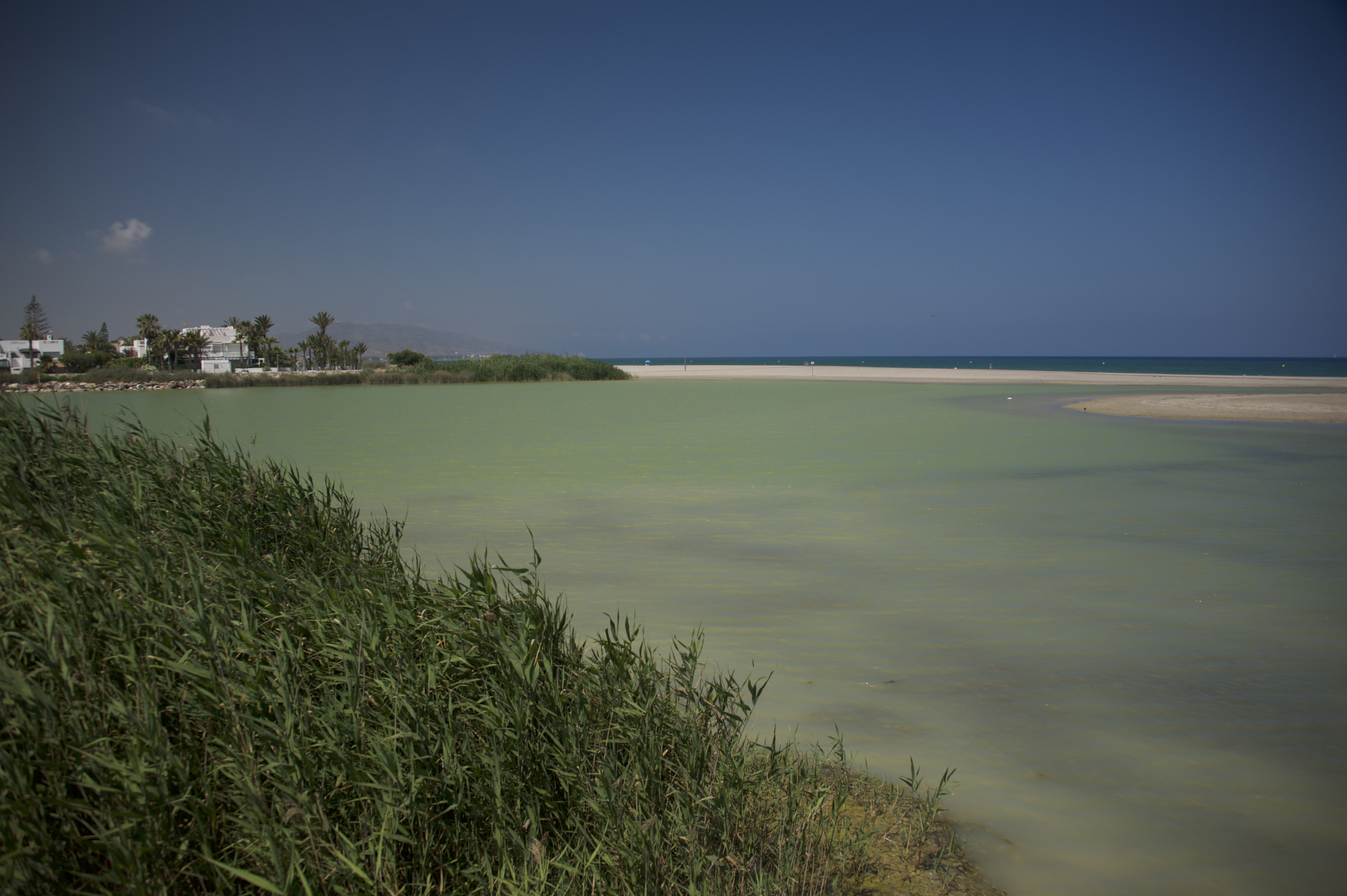 Río Antas This is a photography of a Site of Community Importance in Spain with the ID: ES6110017. Natura2000 entry, EEA entry